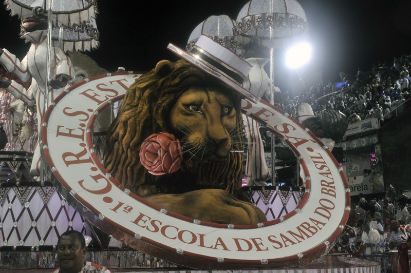 Desfile de 2011 da Estácio de Sá. Foto: Ricardo Almeida.